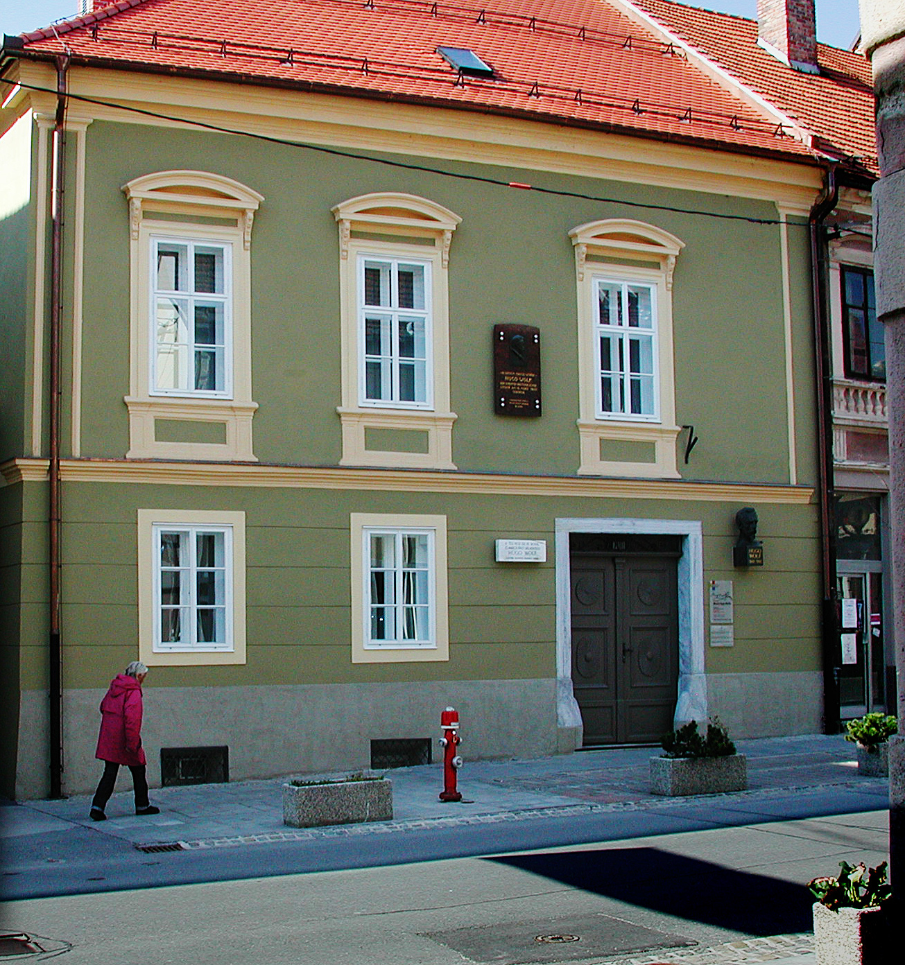 Geburtshaus von Hugo Wolf in Slovenj Gradec / Windischgrätz